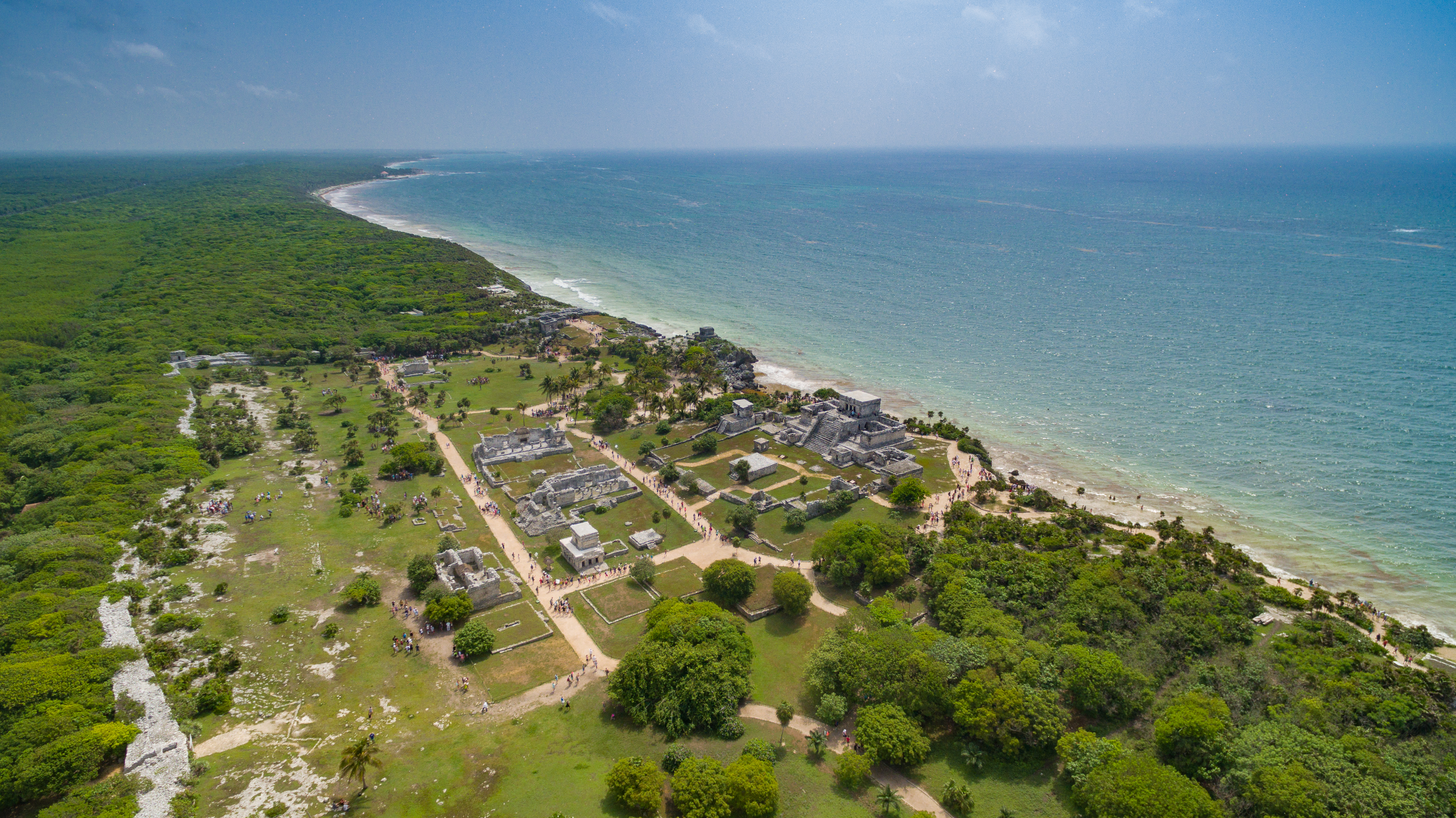 Mexiko